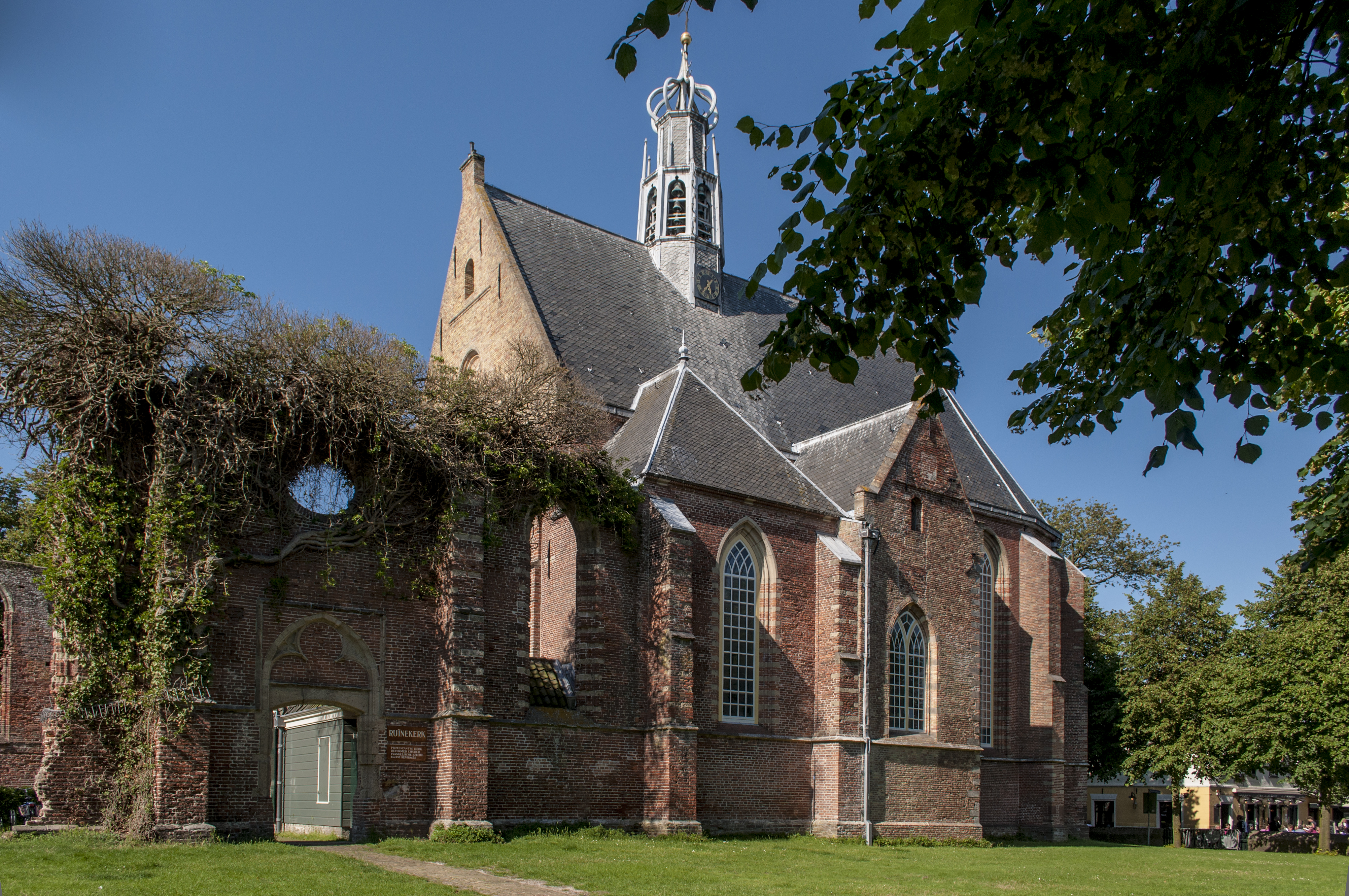 Toren van de Hervormde Kerk